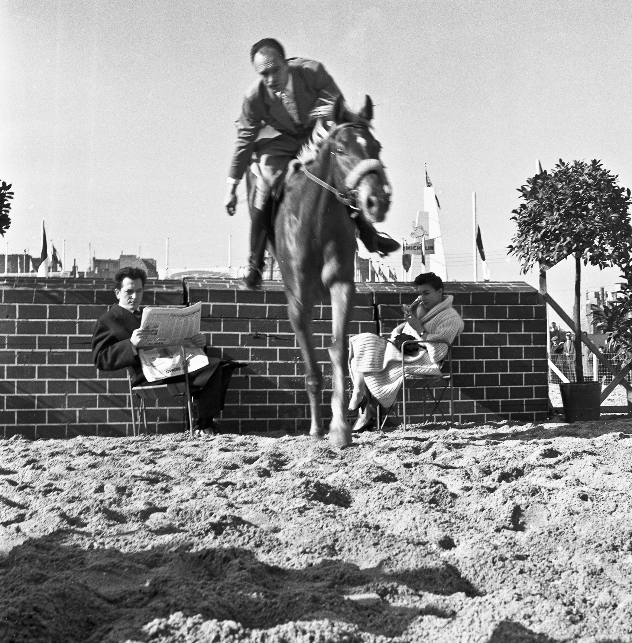 SIA 1957.Pierre Jonquères d'Oriola (Champion olympique à Helsinski en 1952) à gauche Gil Delamare ,à droite Colette Duval How to cite : INRA, DIST, Jean Weber